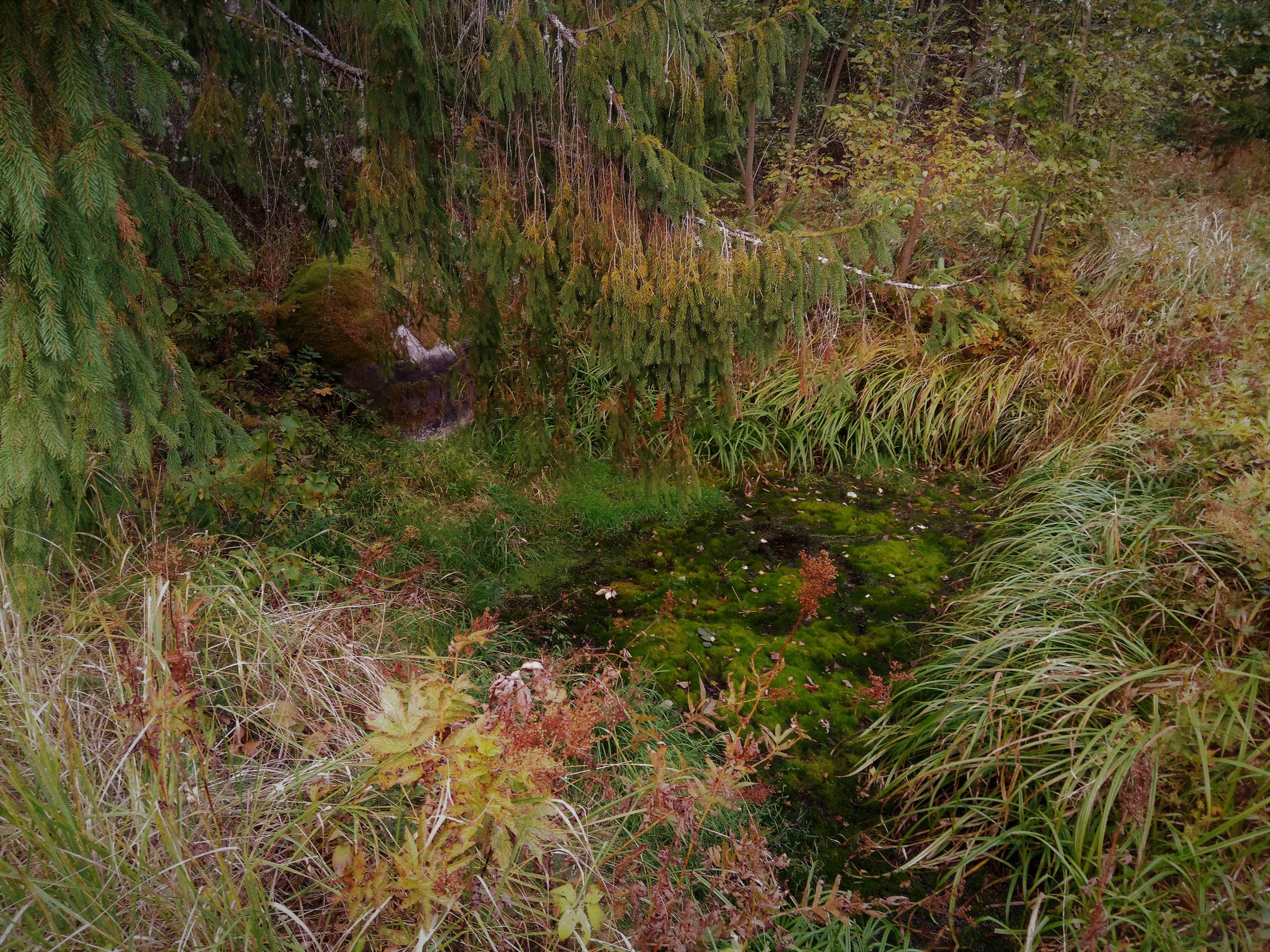 Linaloeauk Loime külas Viljandimaal, see paik on olnud kunagise jääajajärgse Suur-Võrtsjärve põhi. 1985 aasta paiku on tiigipõhi mudast puhastatud, paljastus savipinnas. Praeguseks on seal hakkanud kasvama turbasammal.